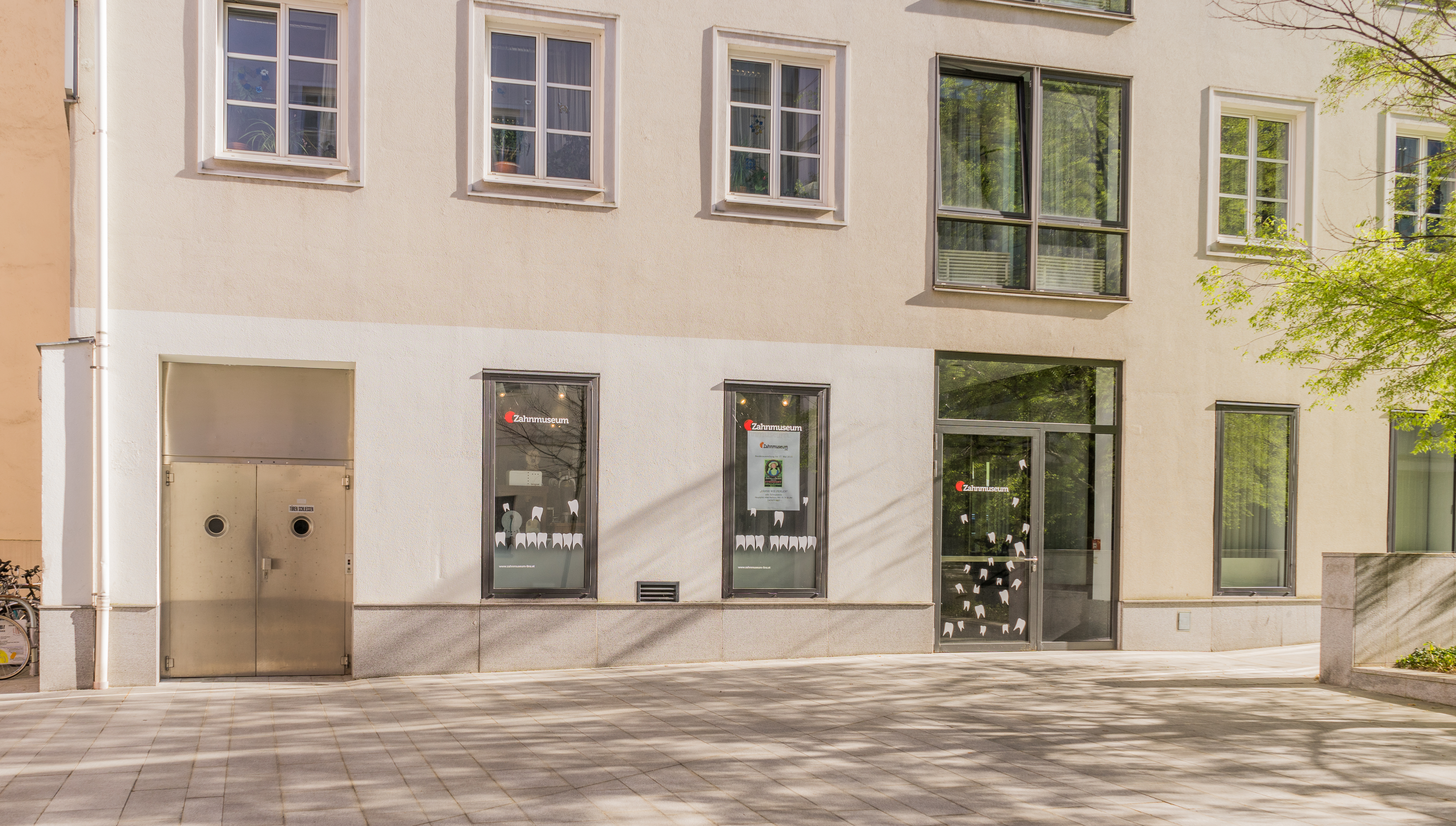 Zahnmuseum in Linz, Österreich.